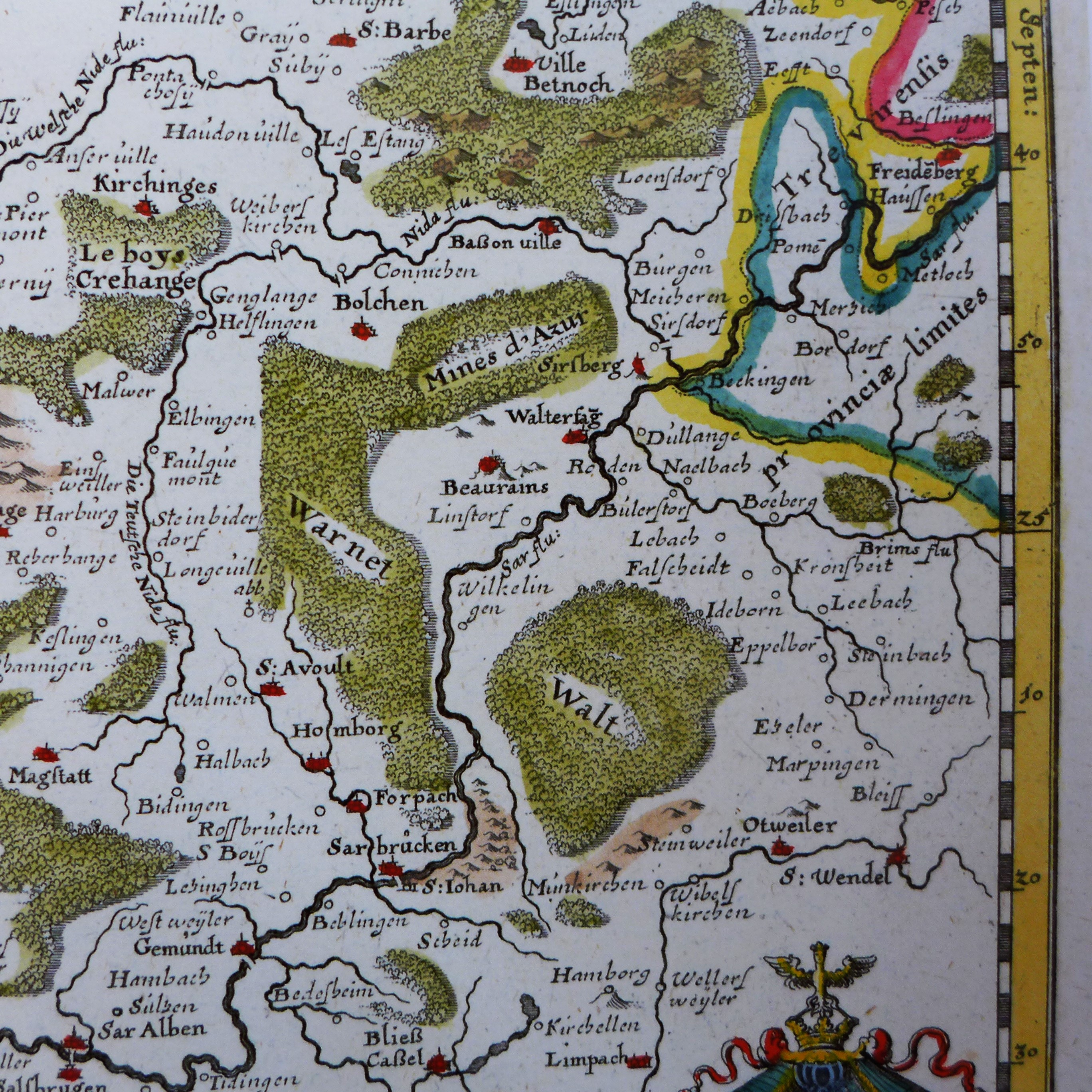 Willlem Janszoon Blaeu: Lotharingia Ducatus, vulgo Lorraine, 1645, ca. 1 : 550.000, 35,4 cm x 25,4 cm, Landesarchiv Saarbrücken, K 66, 2° (Kartenausschnitt)